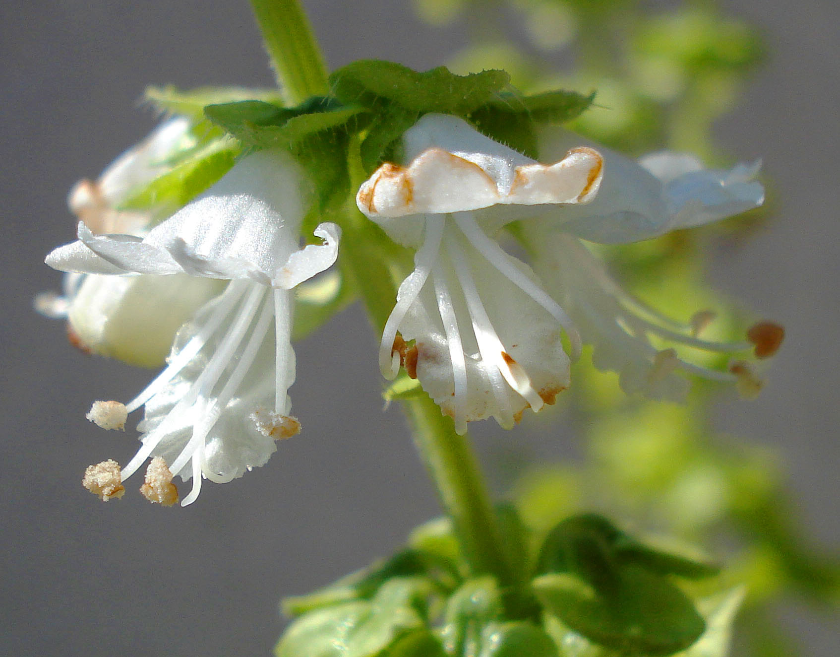 Basilikum